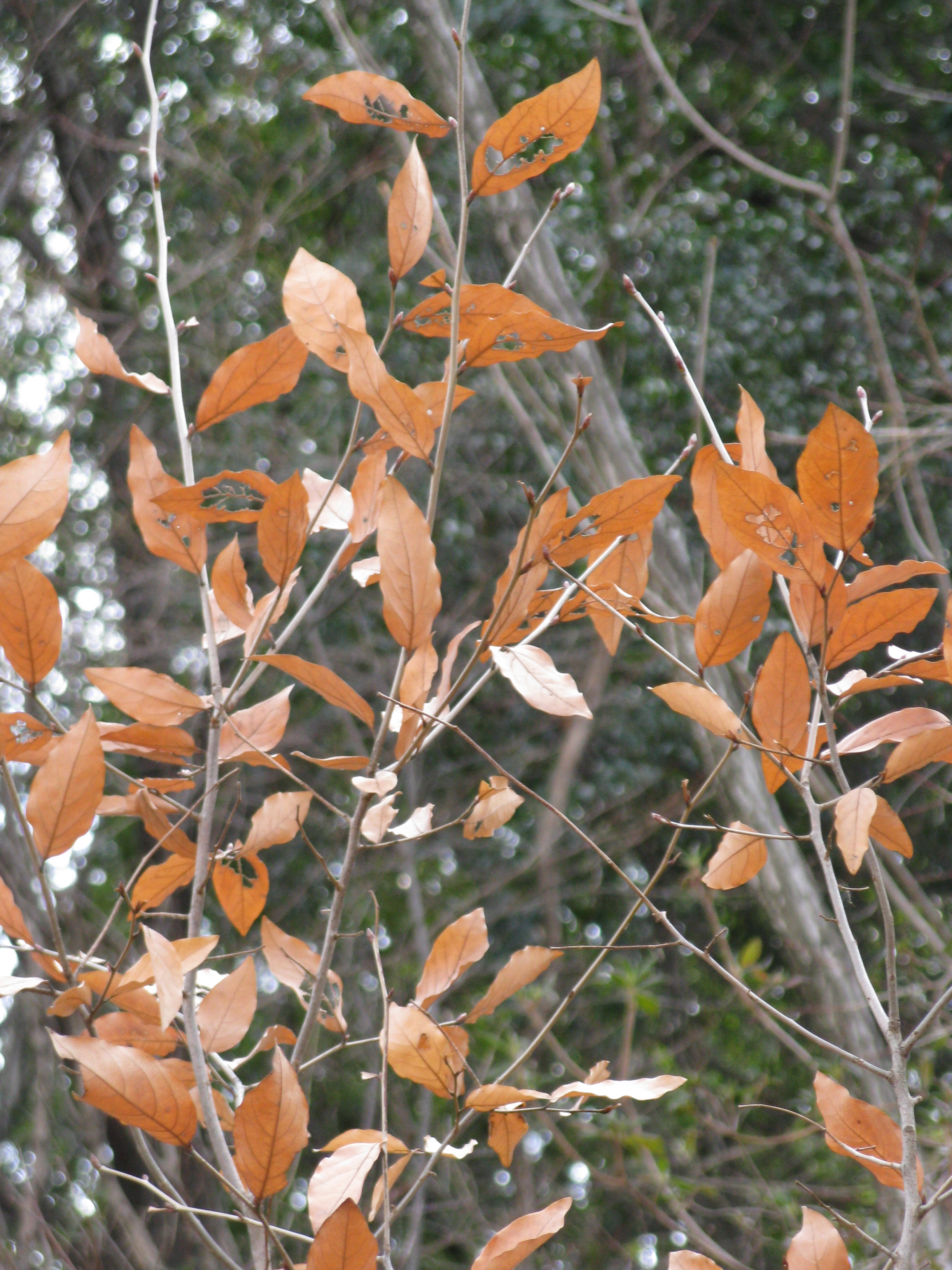 Lindera glauca